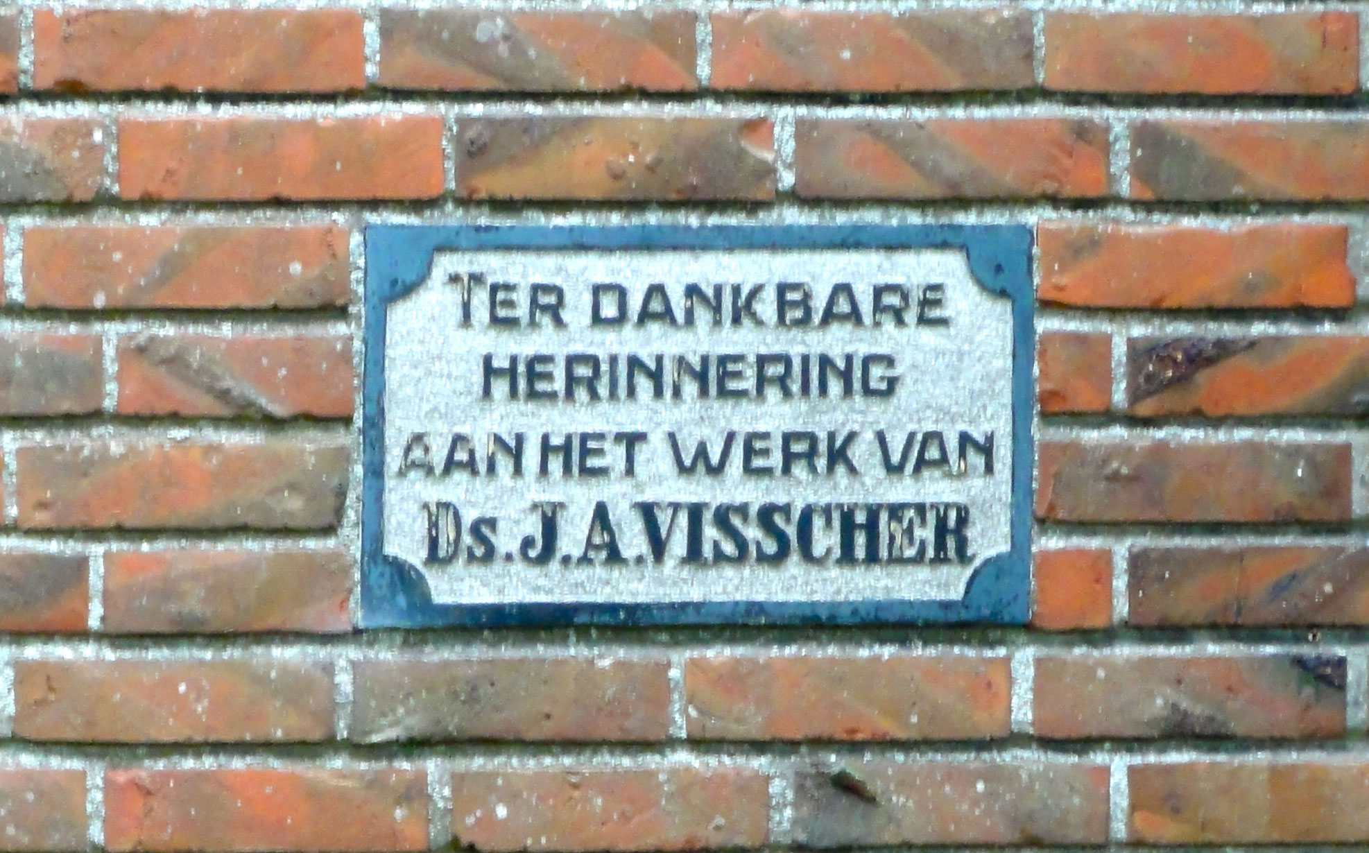 Gedenksteen voor ds Johannes Antonie Visscher in het gebouw Noord Jeruël te Houtigehage